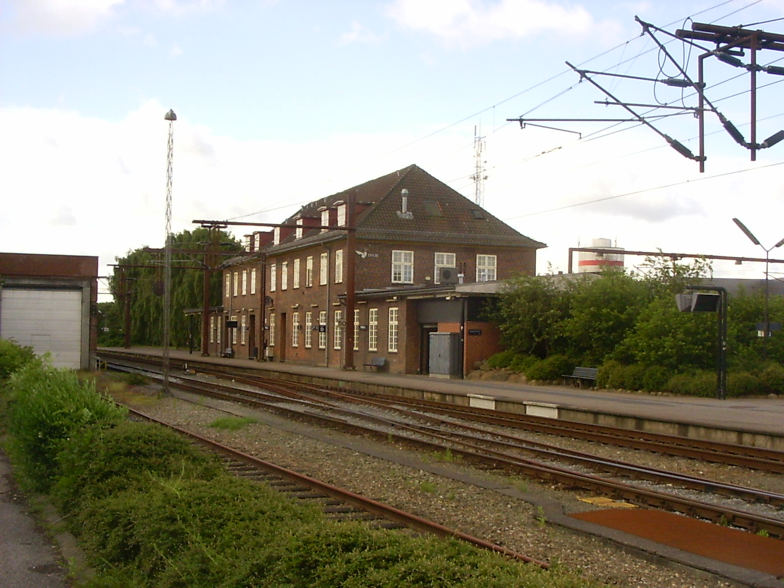 Padborg, station